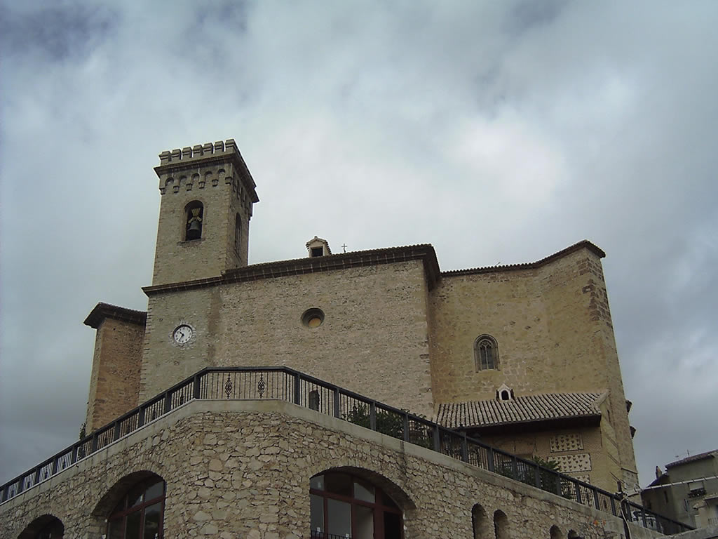 Iglesia de la Asuncion (parroquia de Santa Maria de la Asuncion/Santa María de la Asunción), Moratalla, Murcia, Spain. Own picture, given to PD. Taken in 2005.